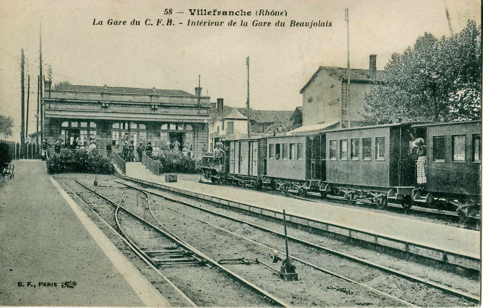 Carte postale ancienne éditée par BF à Paris, n°58 : VILLEFRANCHE (Rhône) - La gare du C. F. B. - Intérieur de la Gare du Beaujolais